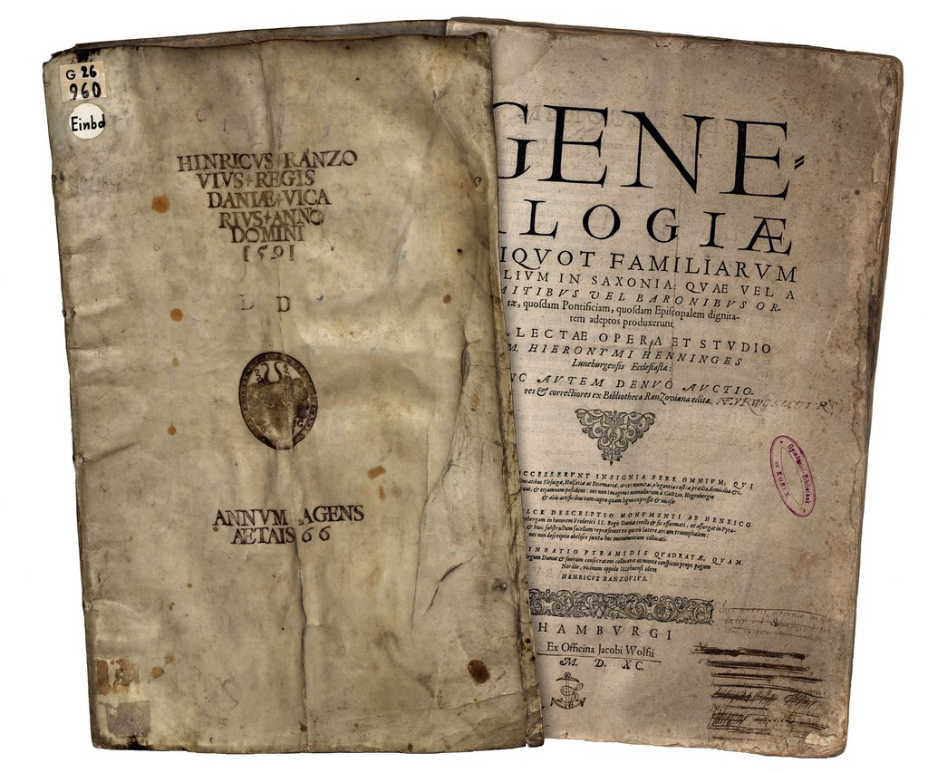 Supralibros der Bibliothek von Heinrich Rantzau (1526-98)